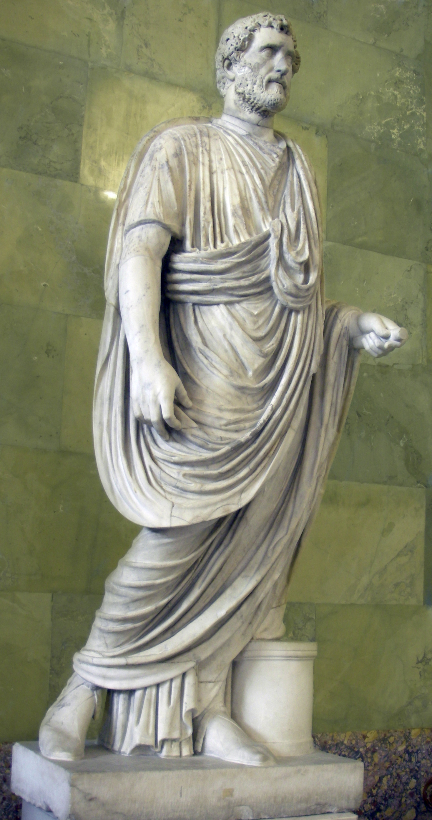 Статуя Антонина Пия (император 131-161 гг). Третья четверть II в. Мрамор, А 164. Эрмитаж, зал Юпитера. Санкт-Петербург, Россия.